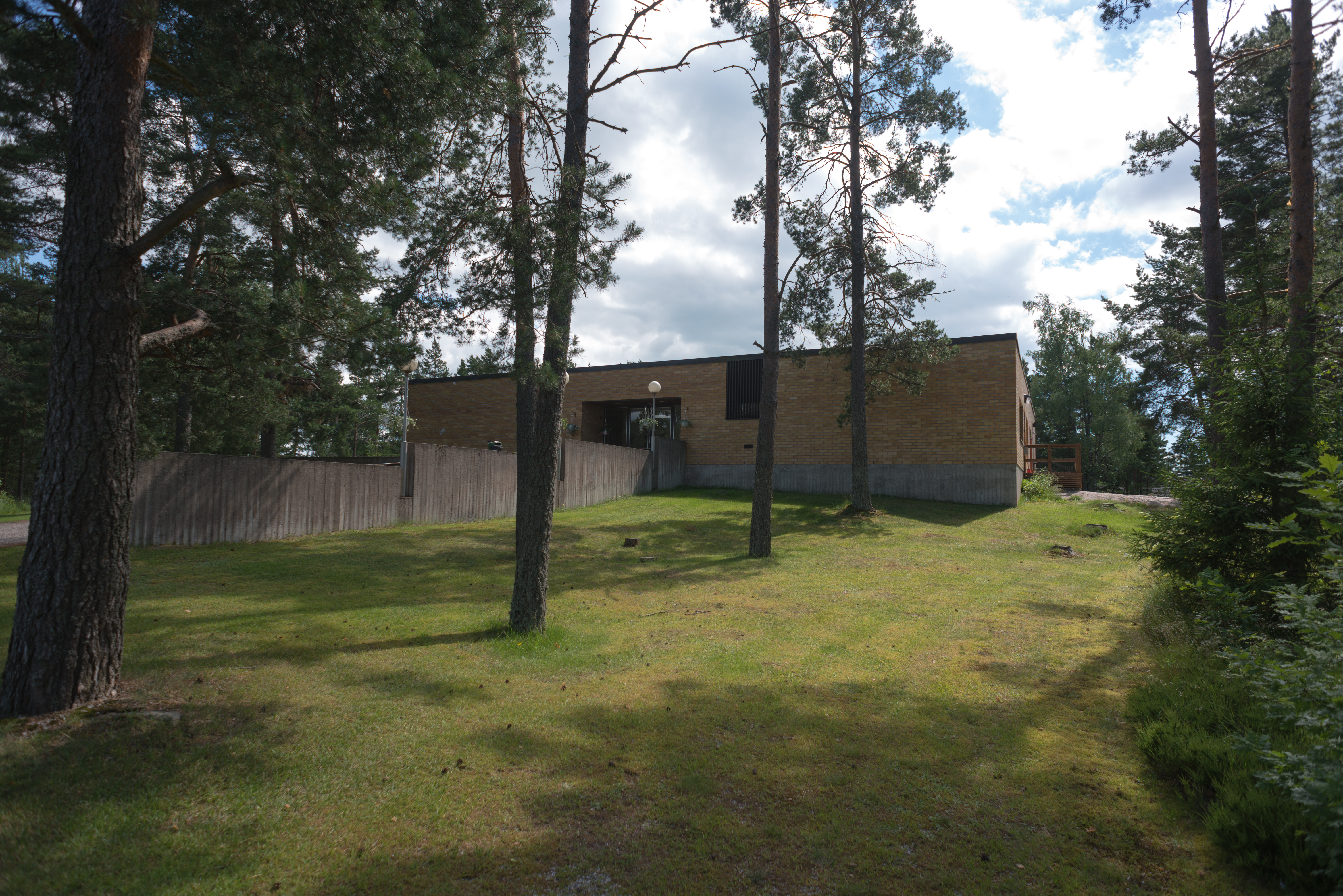 Kuusjoen seurakuntatalo Kuusjoella